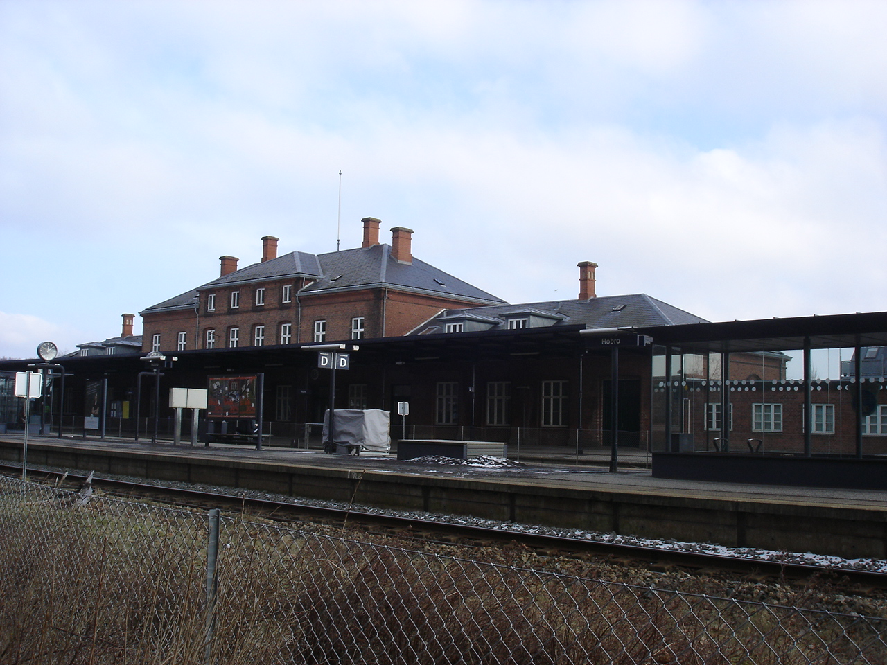 Hobro Station fra sporsiden